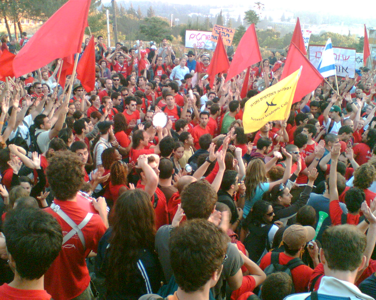 students demonstrate in israel